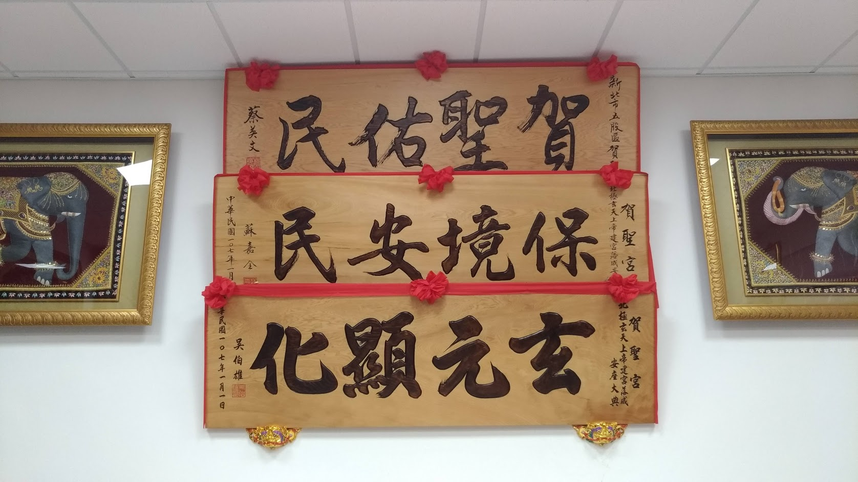 中文（台灣）: 新北 五股 賀聖宮 入火安座 總統蔡英文、立法院長蘇嘉全、國民黨大老吳伯雄致贈匾額